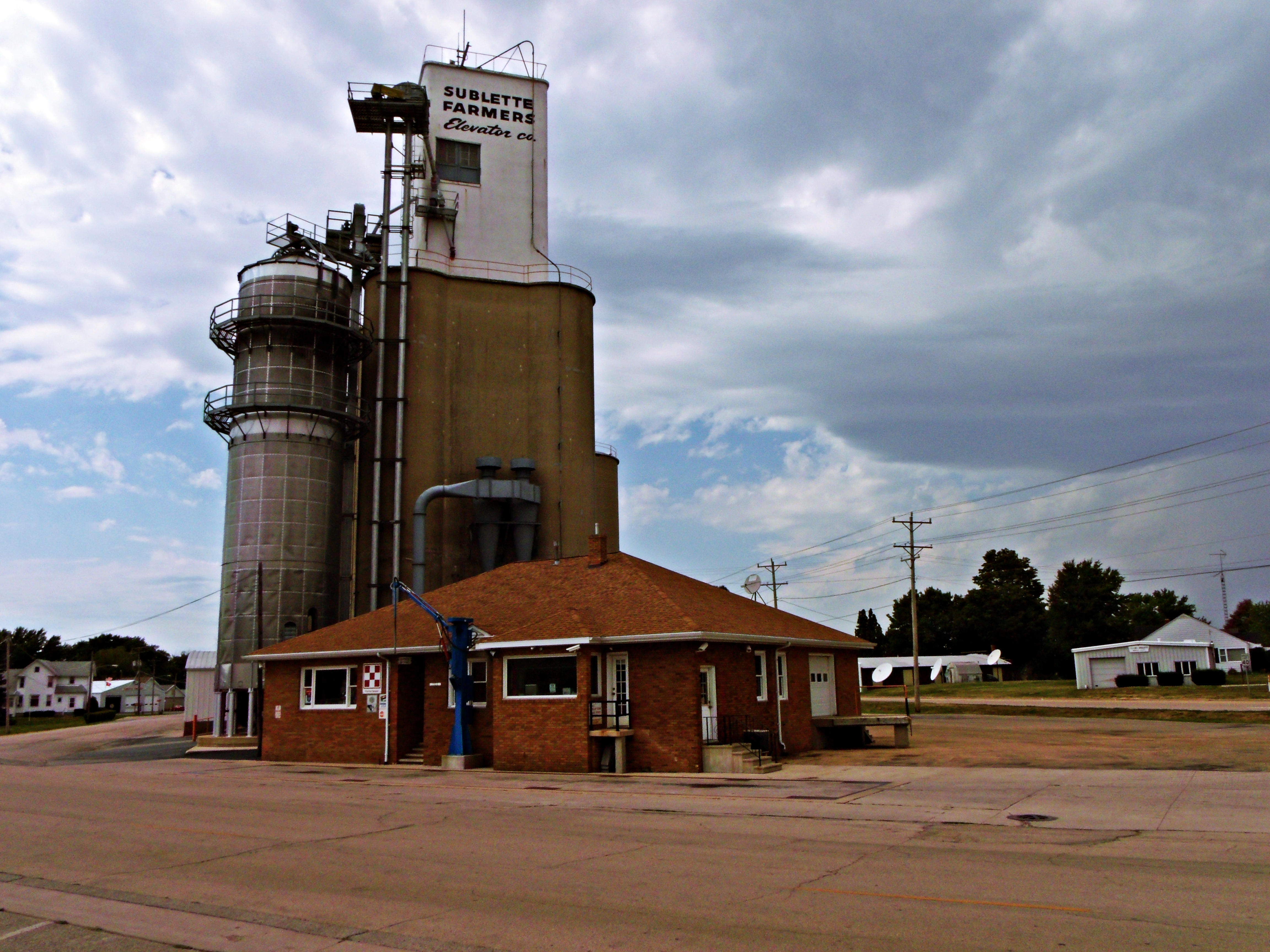 Sublette Farmers Elevator Co., Sublette, Illinois